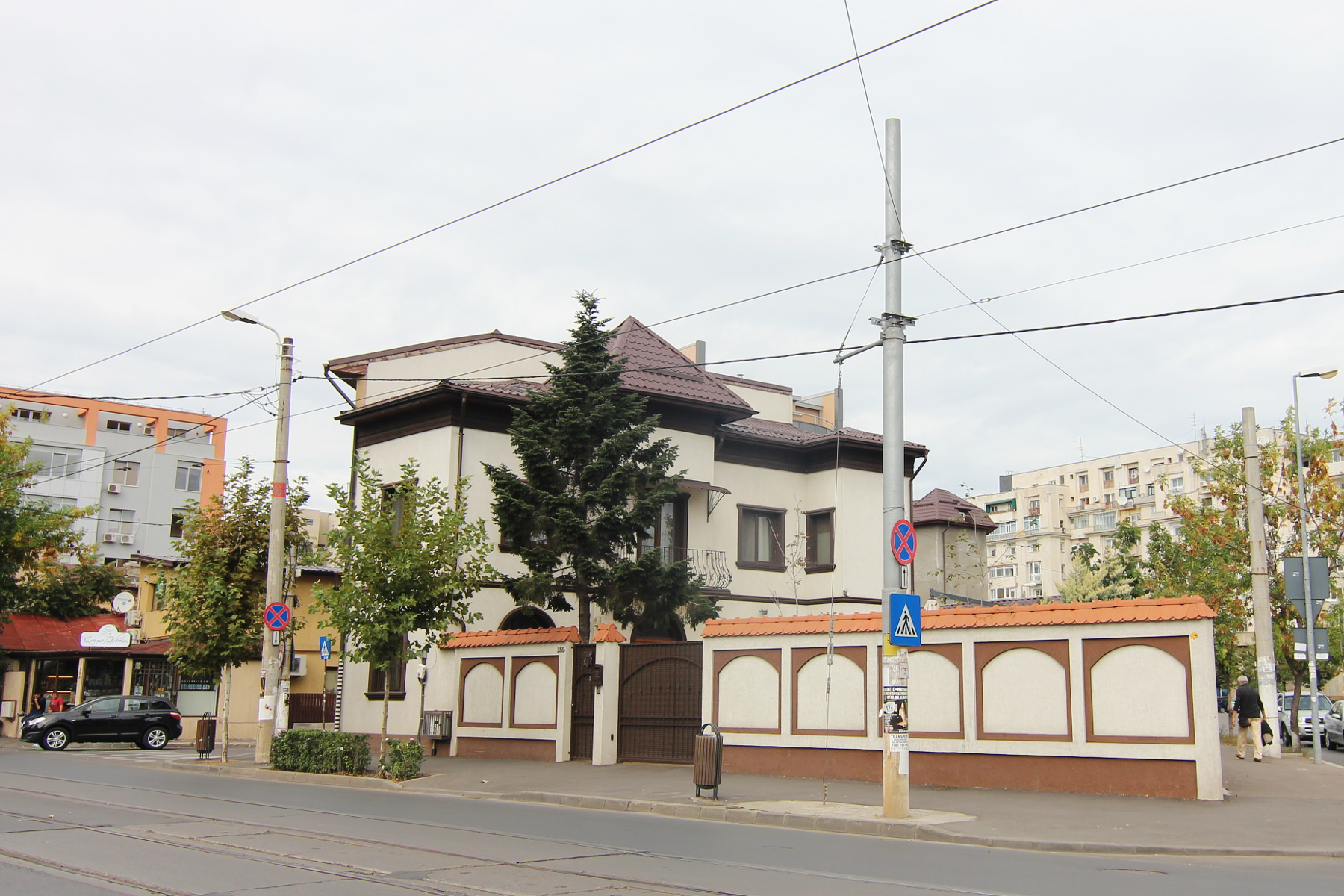 Casă pe Dudești